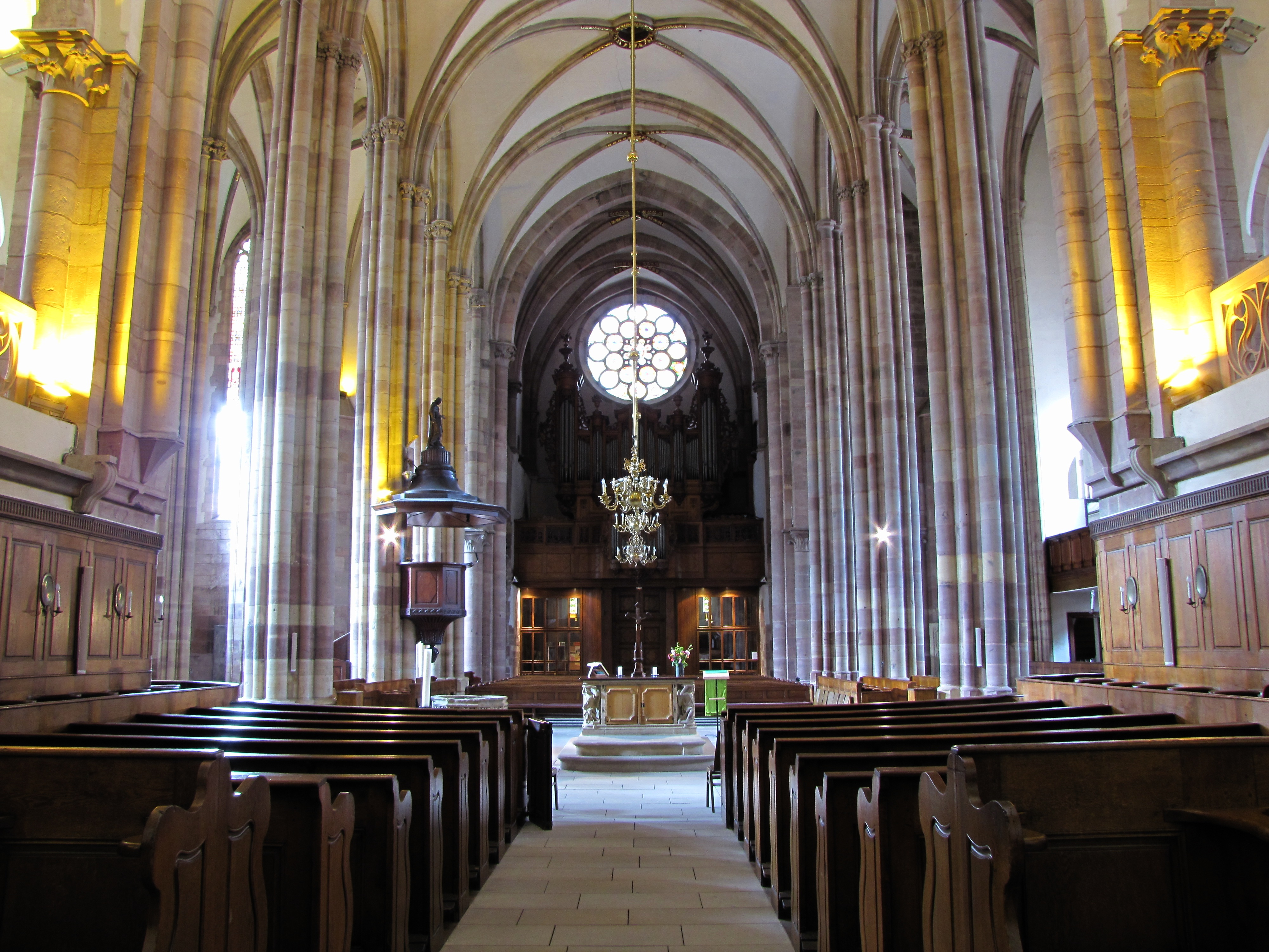 Alsace, Bas-Rhin, Église protestante Saint-Thomas de Strasbourg, 4 rue Martin-Luther (PA00085032). Vue intérieure de la nef vers l'orgue de tribune